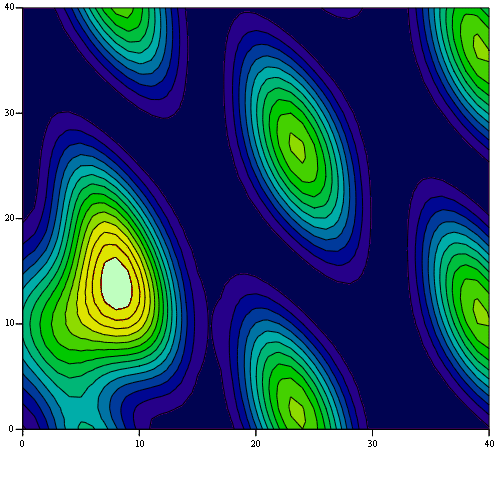 Plot in Mathcad, zelf aangemaakt d.m.v. screenshot